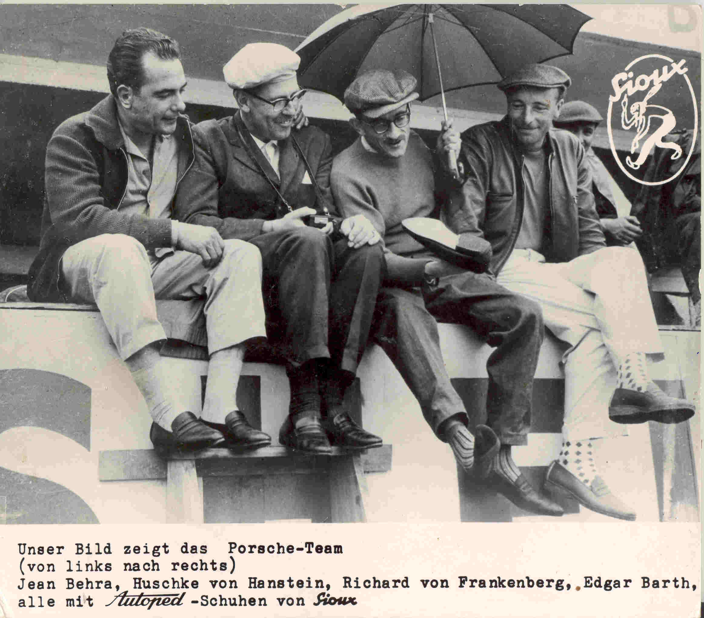 Huschke von Hanstein mit dem Porsche-Rennfahrerteam. Alle mit Autoped-Schuhen von SIOUX, 1958.